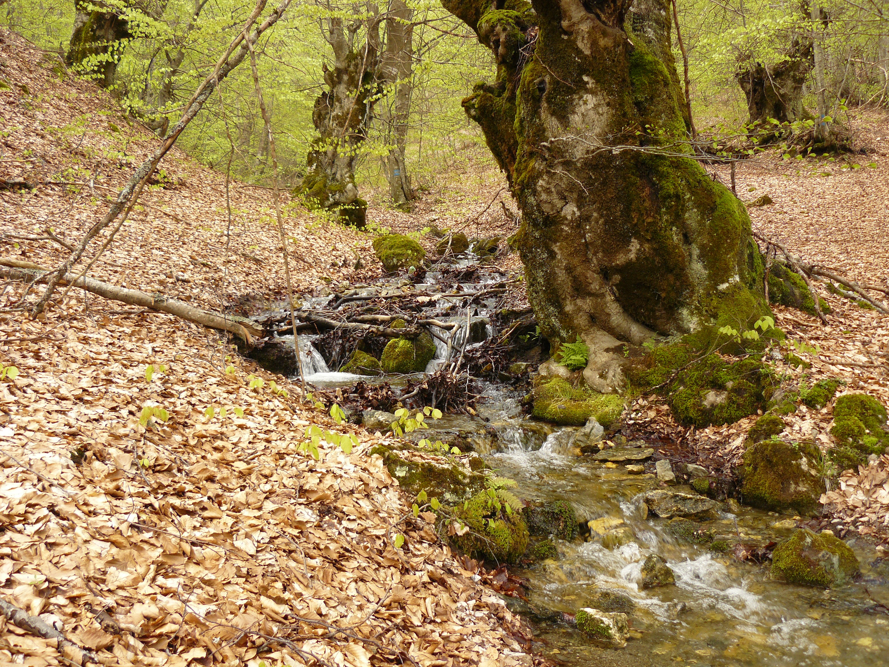 Тајмишка Река кај с. Тајмиште на планината Бистра.